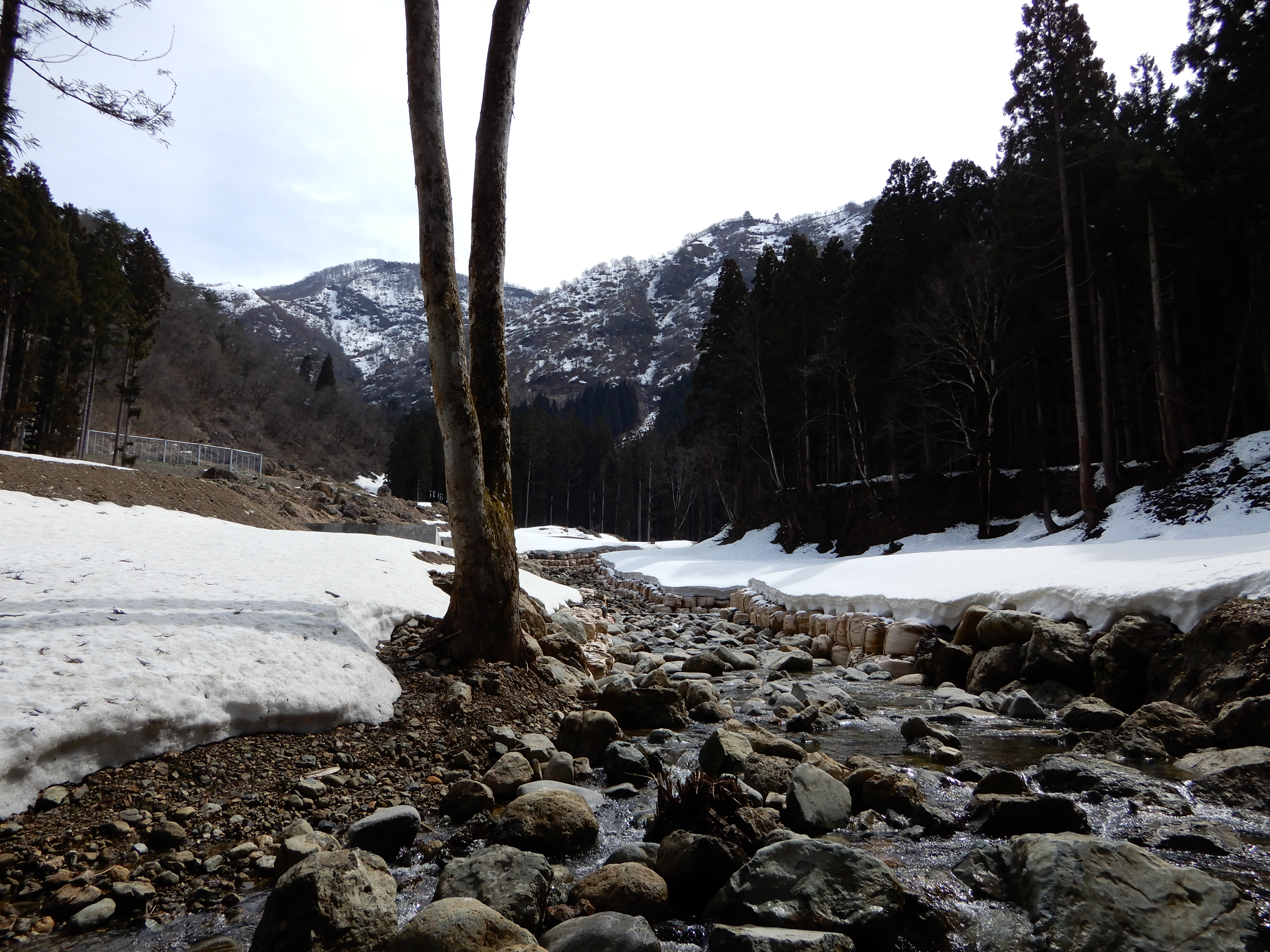 北ノ入川中流 2019-03-26